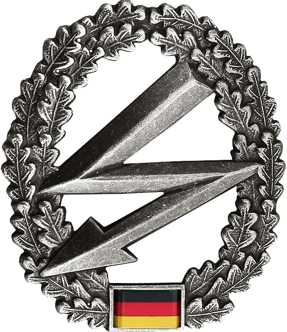 Barettabzeichen der Fernmeldetruppe der Bundeswehr Barettfarbe: Korallenrot Maße: Hoch: 53mm Breit: 46mm Ausführung: altsilber, Metall